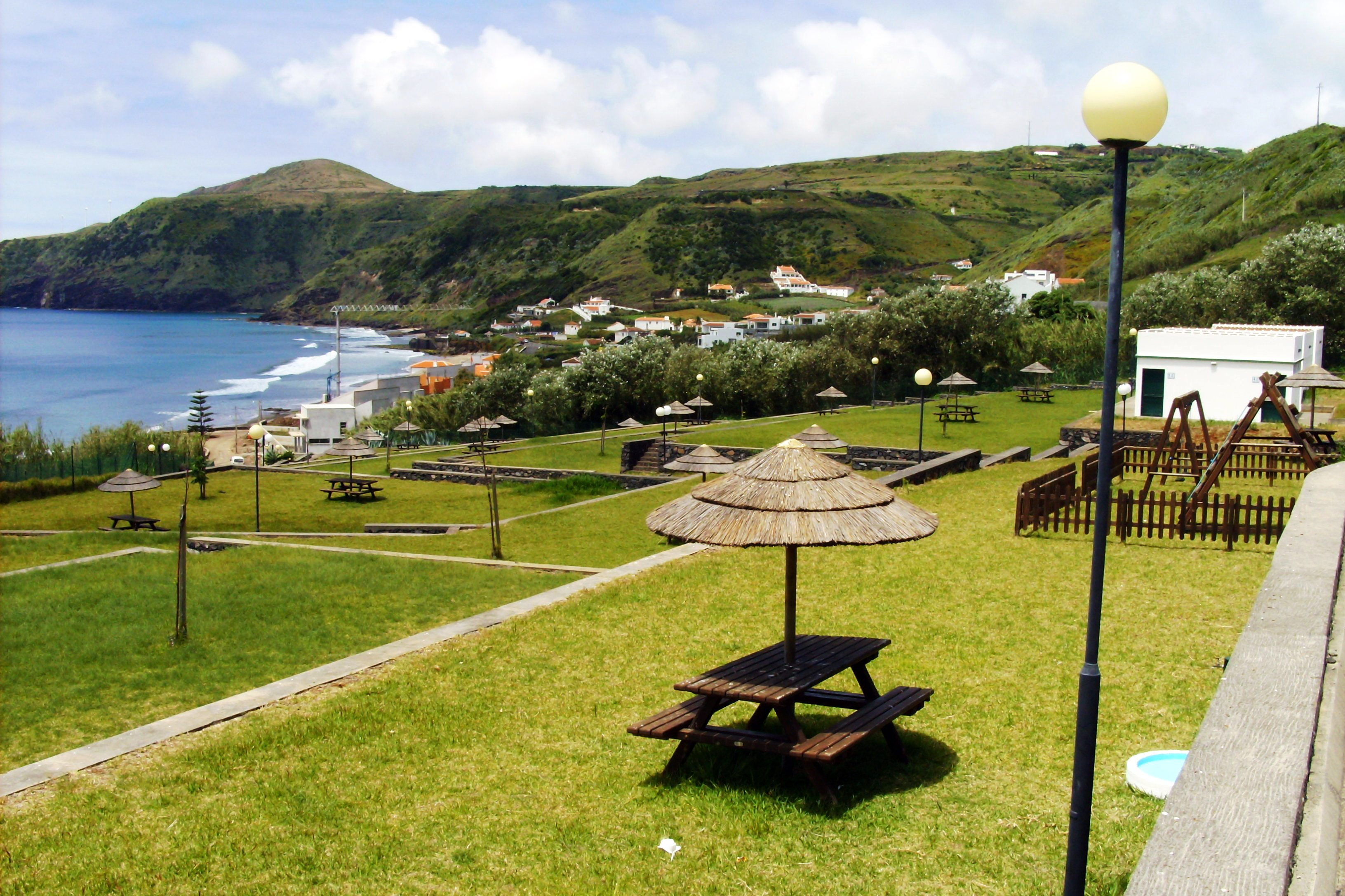 Baía da Praia, freguesia da Almagreira, concelho de Vila do Porto, ilha de Santa Maria, Açores: vista a partir do parque de Campismo.